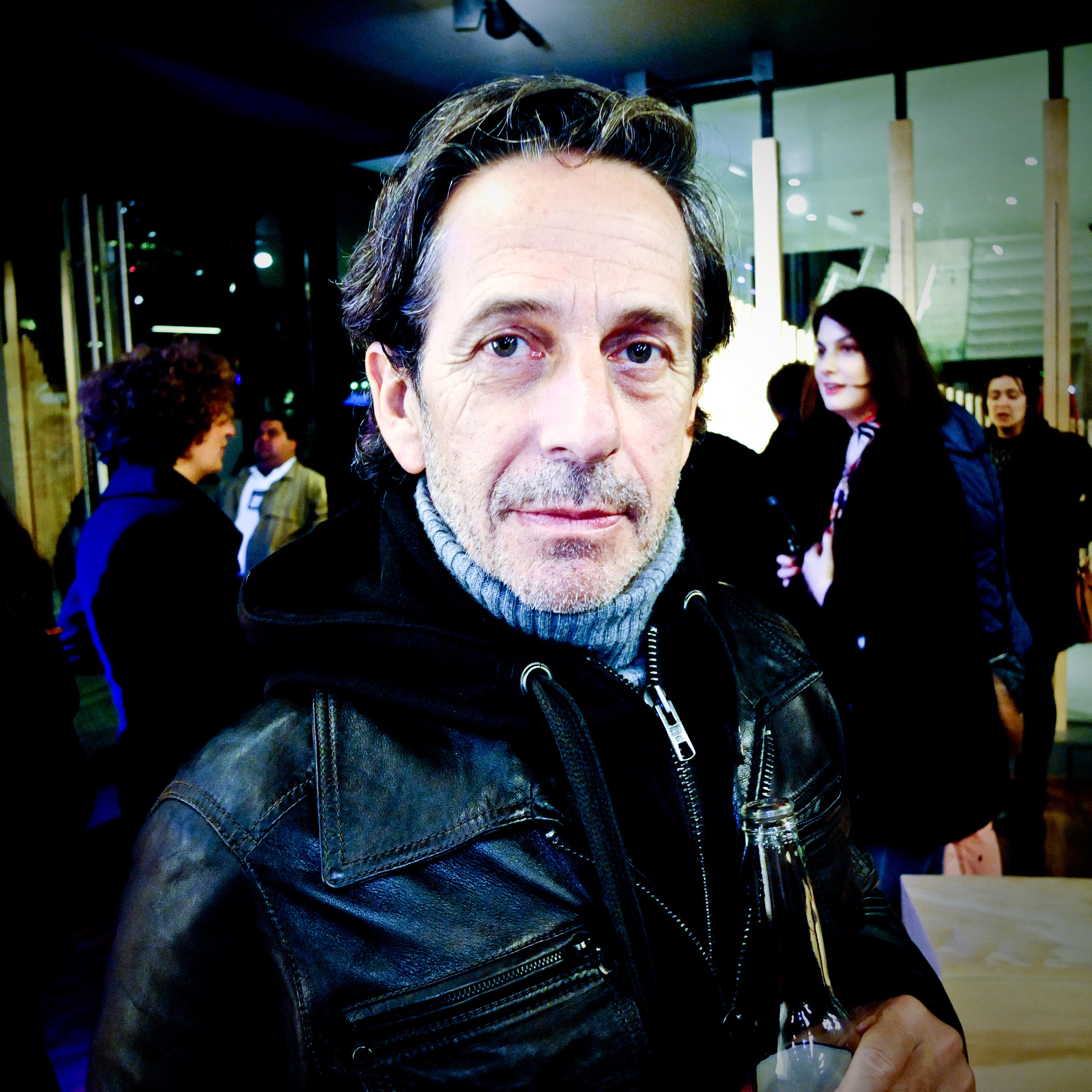 Alfredo Castro en la presentación de la obra "Altavoz" de Sebastián Maquieira, 27 de abril de 2012.